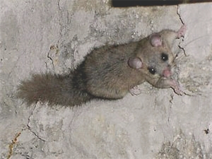 Glis glis